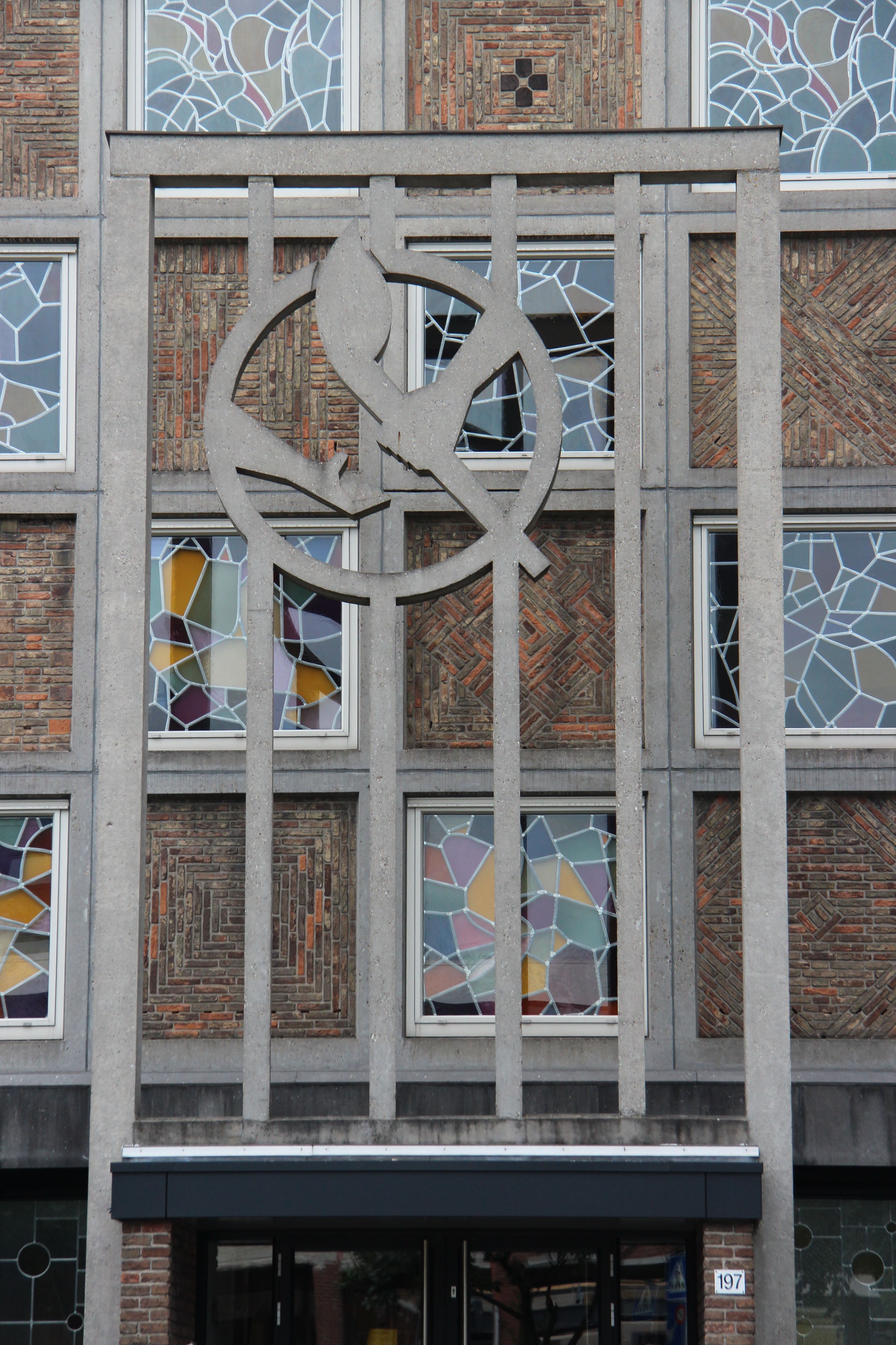 A. Dekker en Pieter van der Sterre - Brandende fakkel - 1961, gevelversiering van de in 1961 voltooide kerk van het Apostolisch Genootschap aan de Sumatrastraat 197 in Leiden.